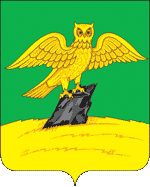 Герб Киржача Владимирской области